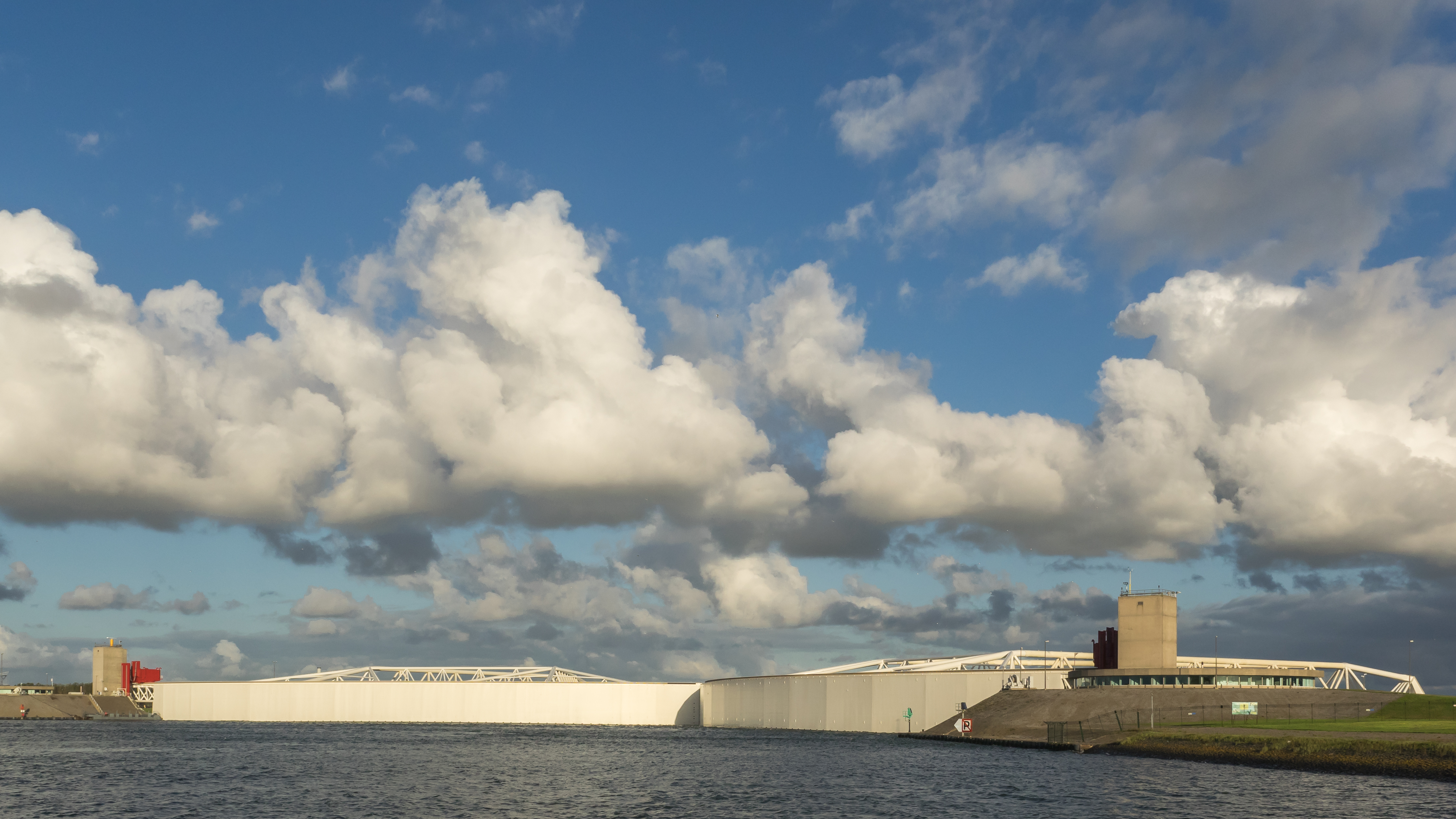 De Maeslantkering is een in 1997 in gebruik genomen stormvloedkering op de grens van Het Scheur en de Nieuwe Waterweg bij Hoek van Holland. De kering maakt deel uit van de Europoortkering, het laatste onderdeel van de Deltawerken. Tekst: Wikipedia.